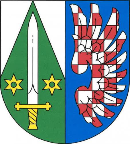 Velemín znak